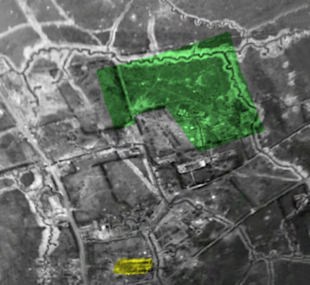 Luftbild 1916 Wyschaete, Ausgrabungsfläche von 2018 grün eingezeichnet, Kirche gelb